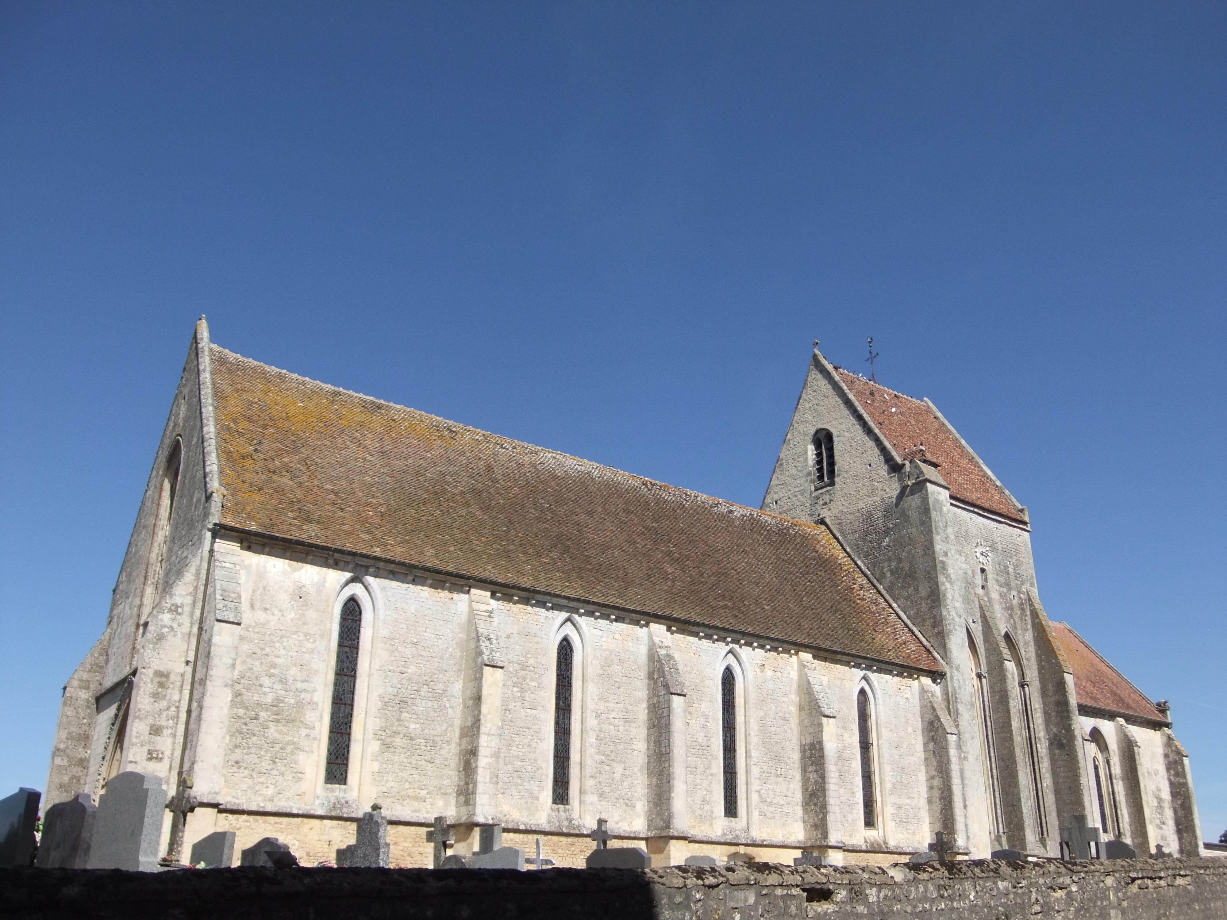 Eglise Saint-Martin .